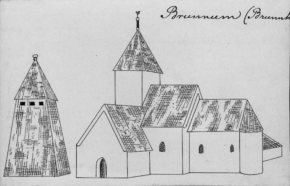 Kyrkan och klockstapeln från söder. Teckning efter Peringskiölds monumenta. Kategori: (01) ExteriörerKyrkan och klockstapeln från söder. Teckning efter Peringskiölds monumenta.